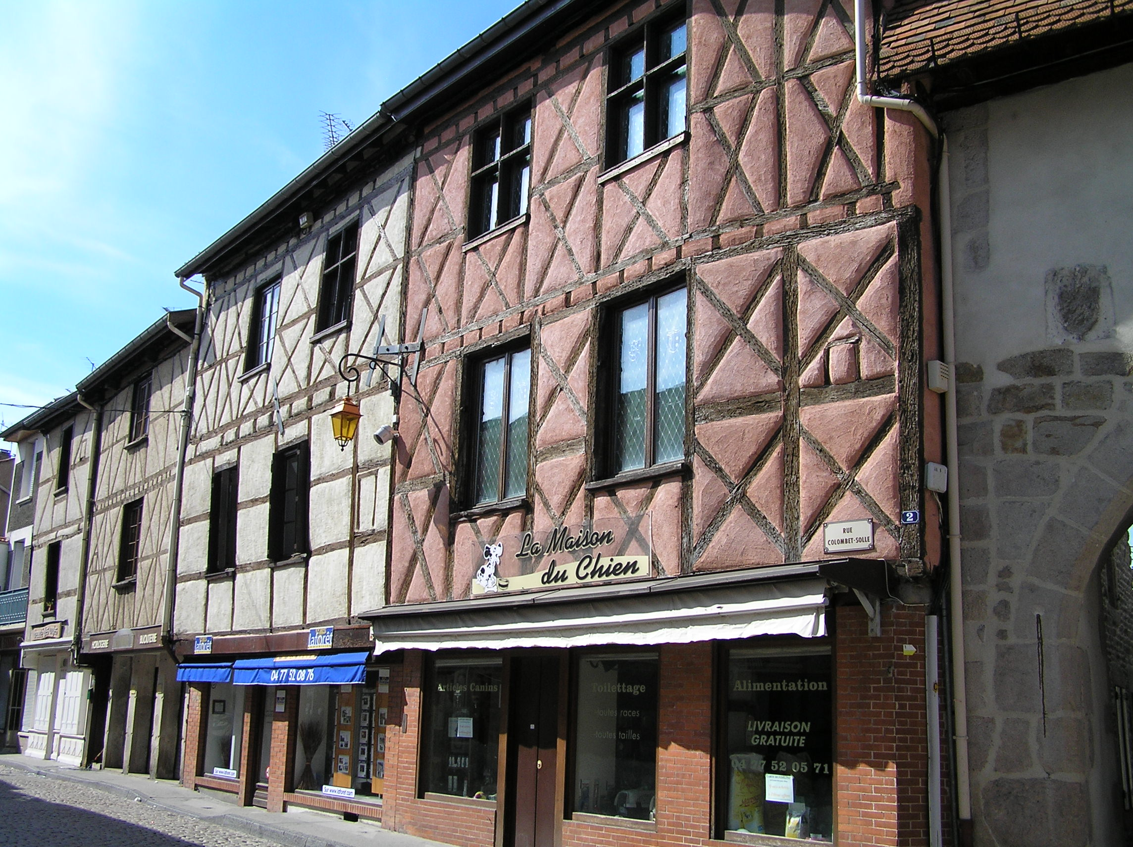 Vieilles maisons à Saint-Rambert (Loire)